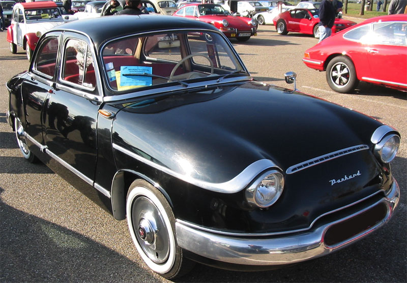 Photographie d'une berline Panhard PL 17 type mine L1, prise le 4 Novembre 2006 au salon Epoqu'Auto de Lyon.